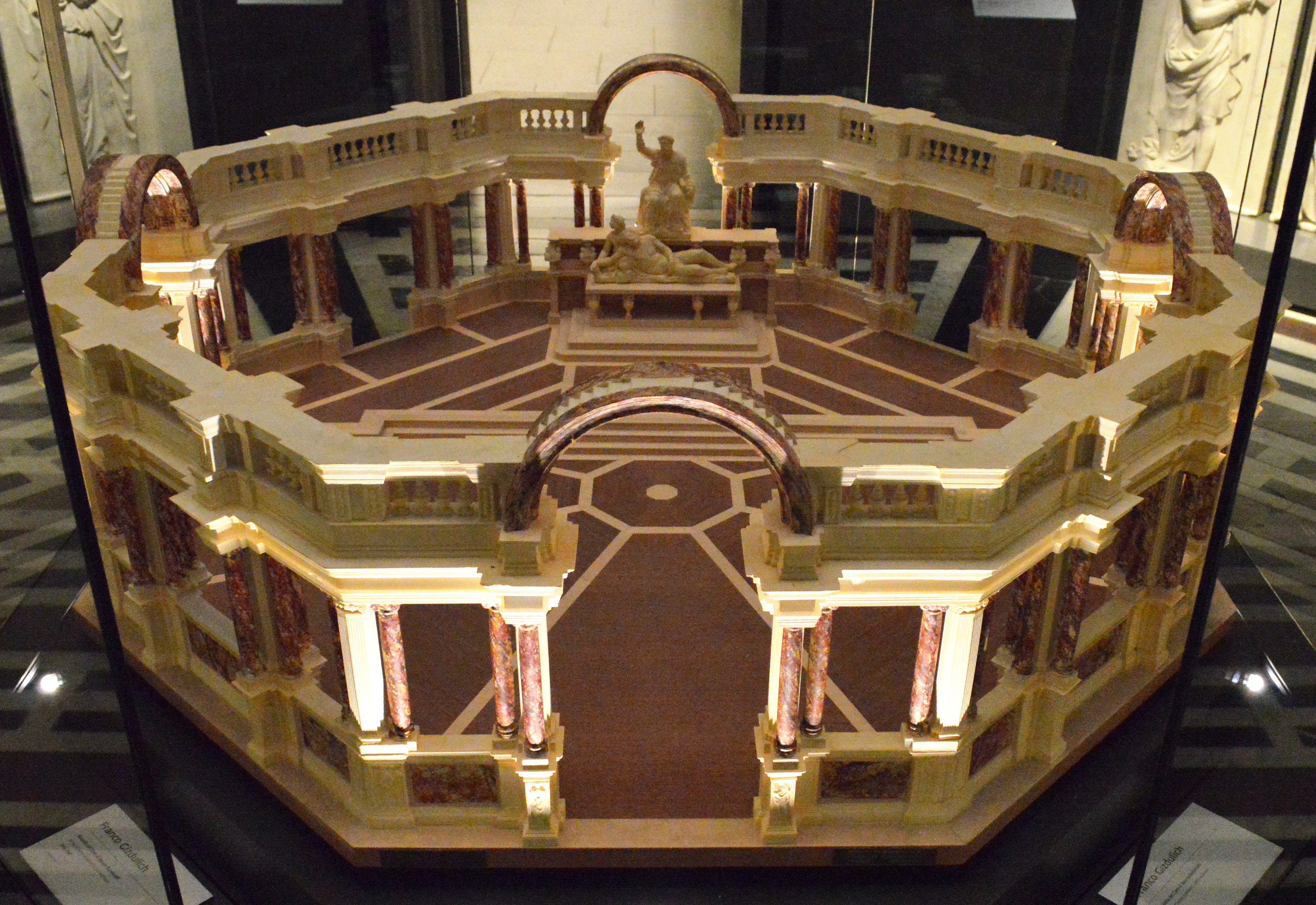 Modello del coro di Baccio Bandinelli e Giuliano di Baccio d'Agnolo. Realizzazione in gesso delle sculture a cura di Maria Chiara Cecconi.